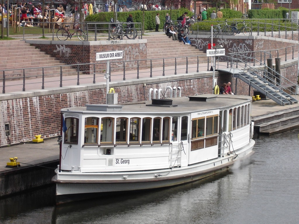 Alsterdampfer "St. Georg" am Anleger des Museums der Arbeit, Hamburg.